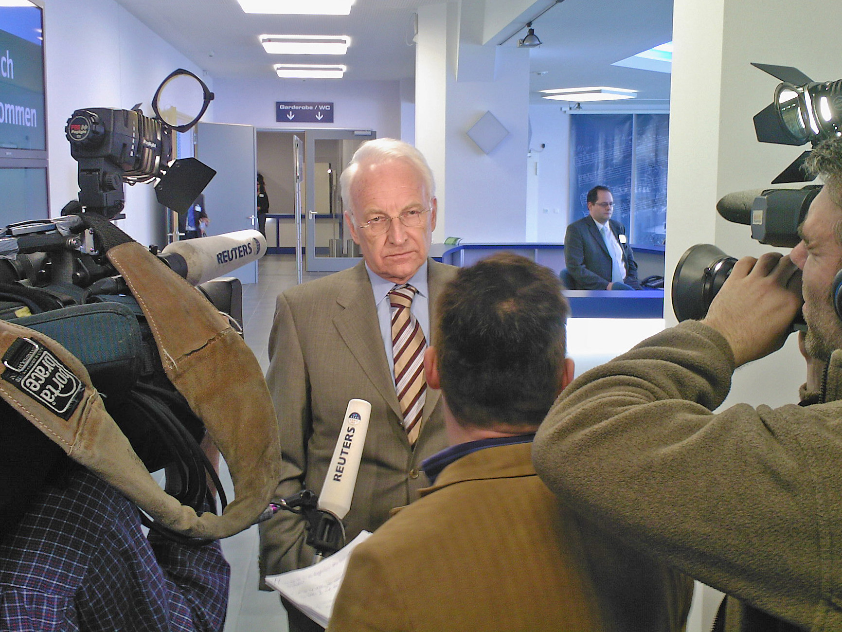 Edmund Stoiber bei einem Interview während einer Veranstaltung zur Diskussion des neuen Grundsatzprogramms im Vogel Convention Center in Würzburg